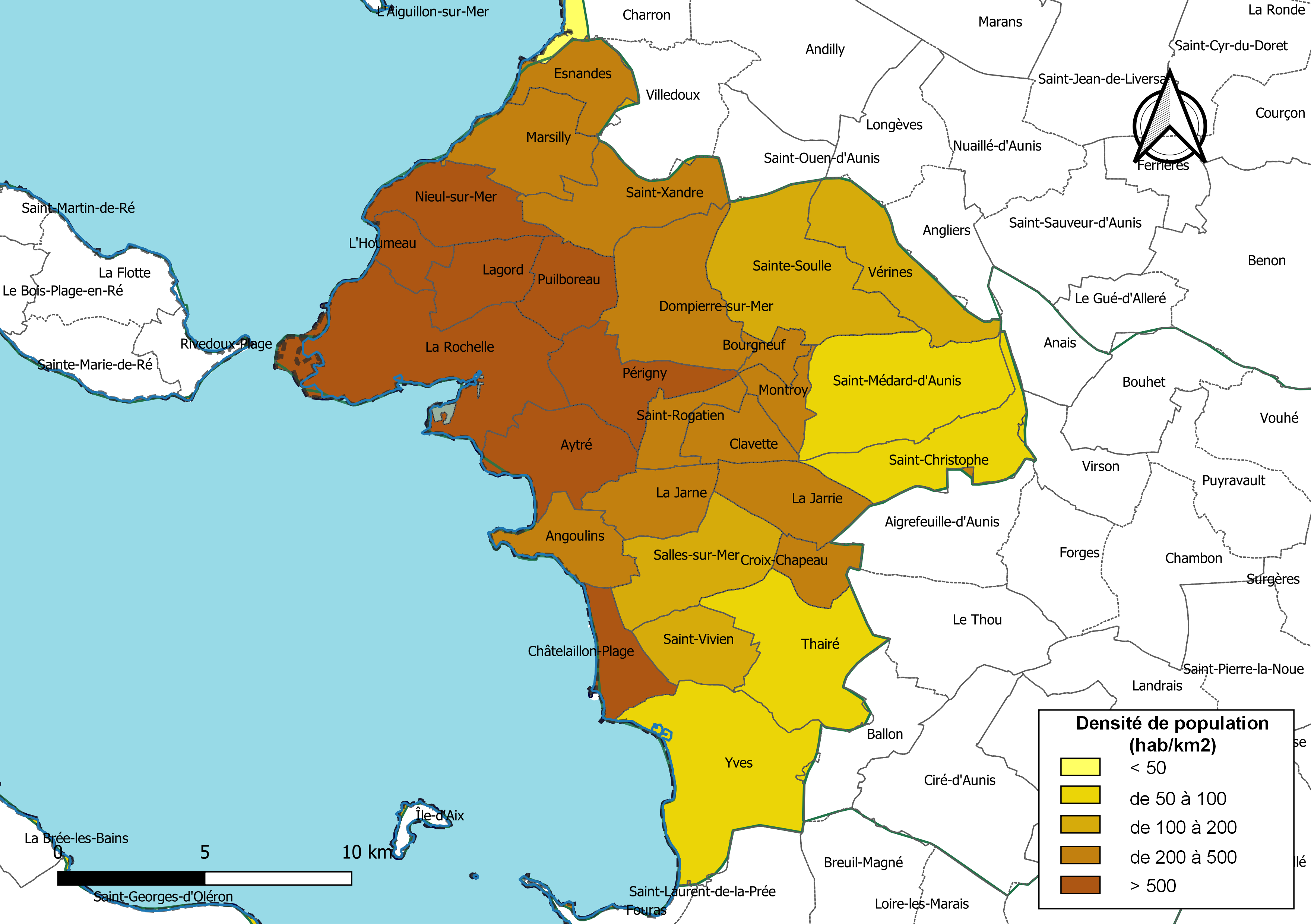 Carte des densités de population (millésimée 2016) des communes de la communauté de communes la Communauté d'agglomération de La Rochelle, département de la Charente-Maritime, France. Composition au 1er janvier 2019.